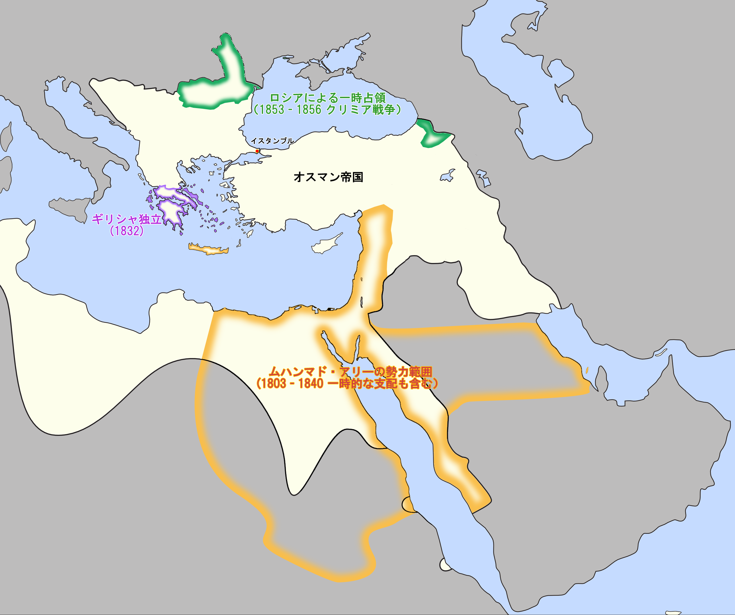 タンジマート期前後の時代のオスマン帝国周辺の状況。File:Cildir Eyalet, Ottoman Empire (1795).pngを元に、山川出版社『西アジア史1』p.399の地図および、File:Crimean-war-1853-56.pngを参考に作成。